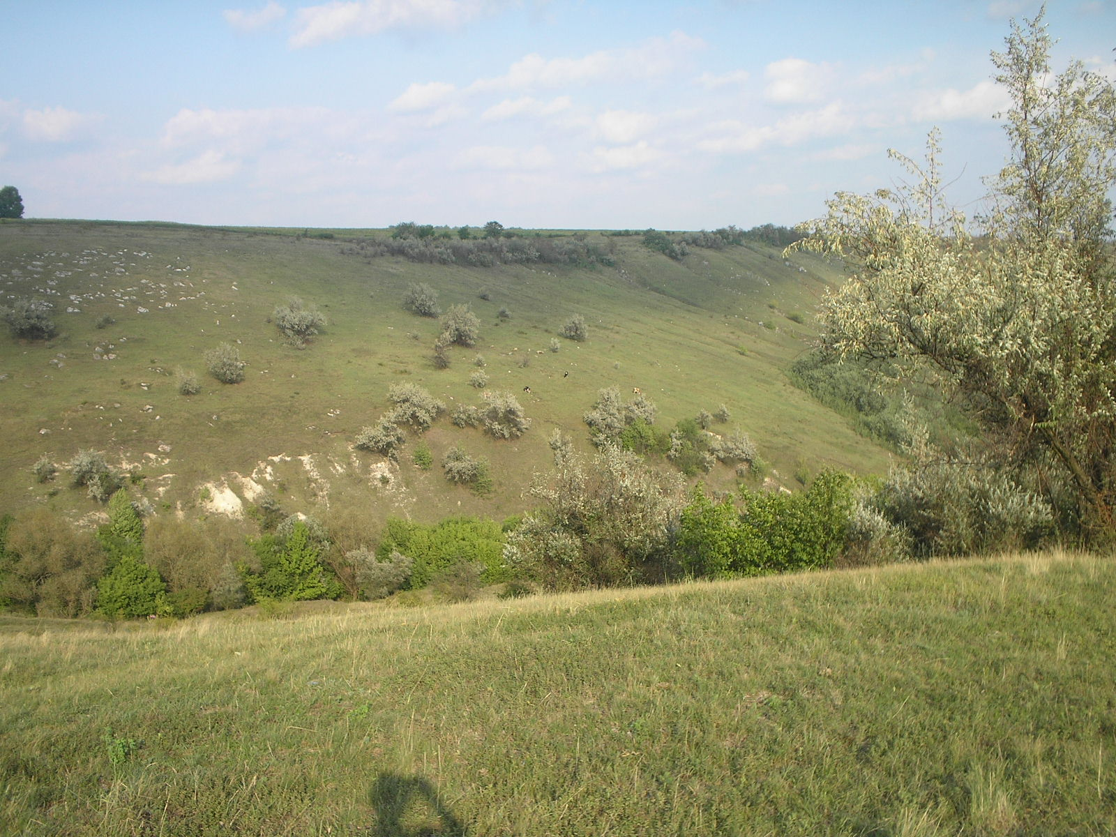 Бронницький, Могилів-Подільський р-н, с. Бронниця